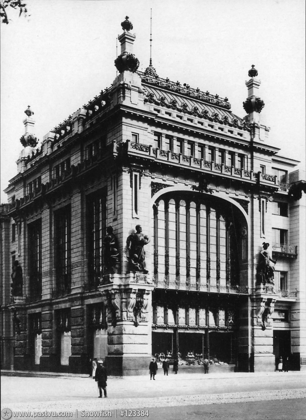 Елисеевский магазин, фото 1903 года.